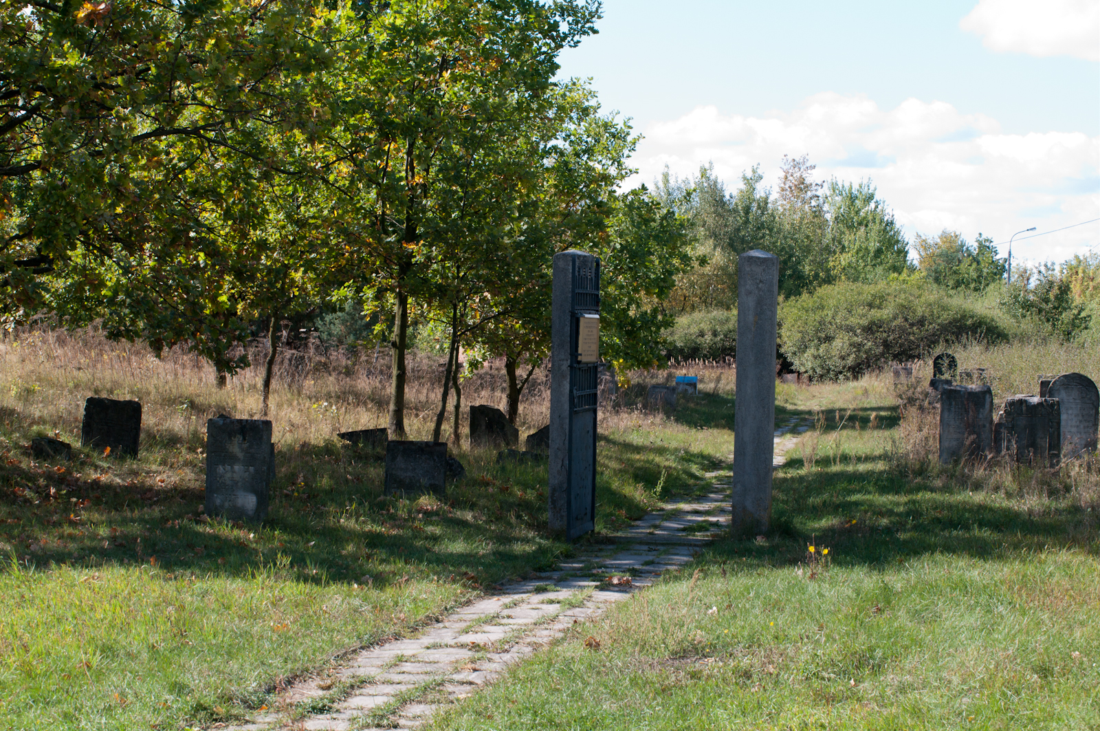 cmentarz żydowski, 1802, macewy (widok od bramy) Góra Kalwaria, Gmina Góra Kalwaria